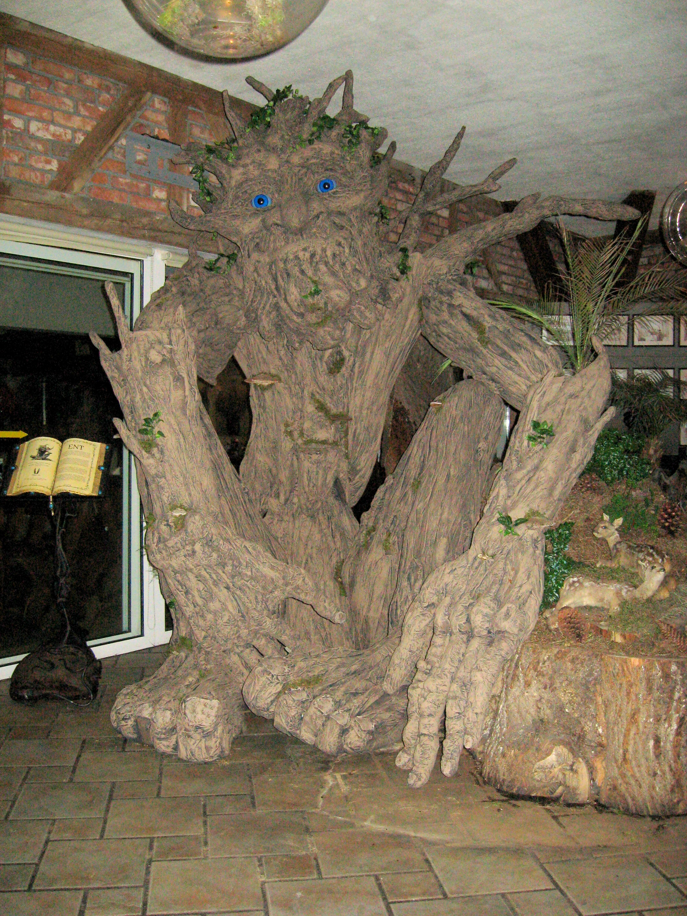 projekt Ent wykonany przez Marek Zaleski Mazagro-Art